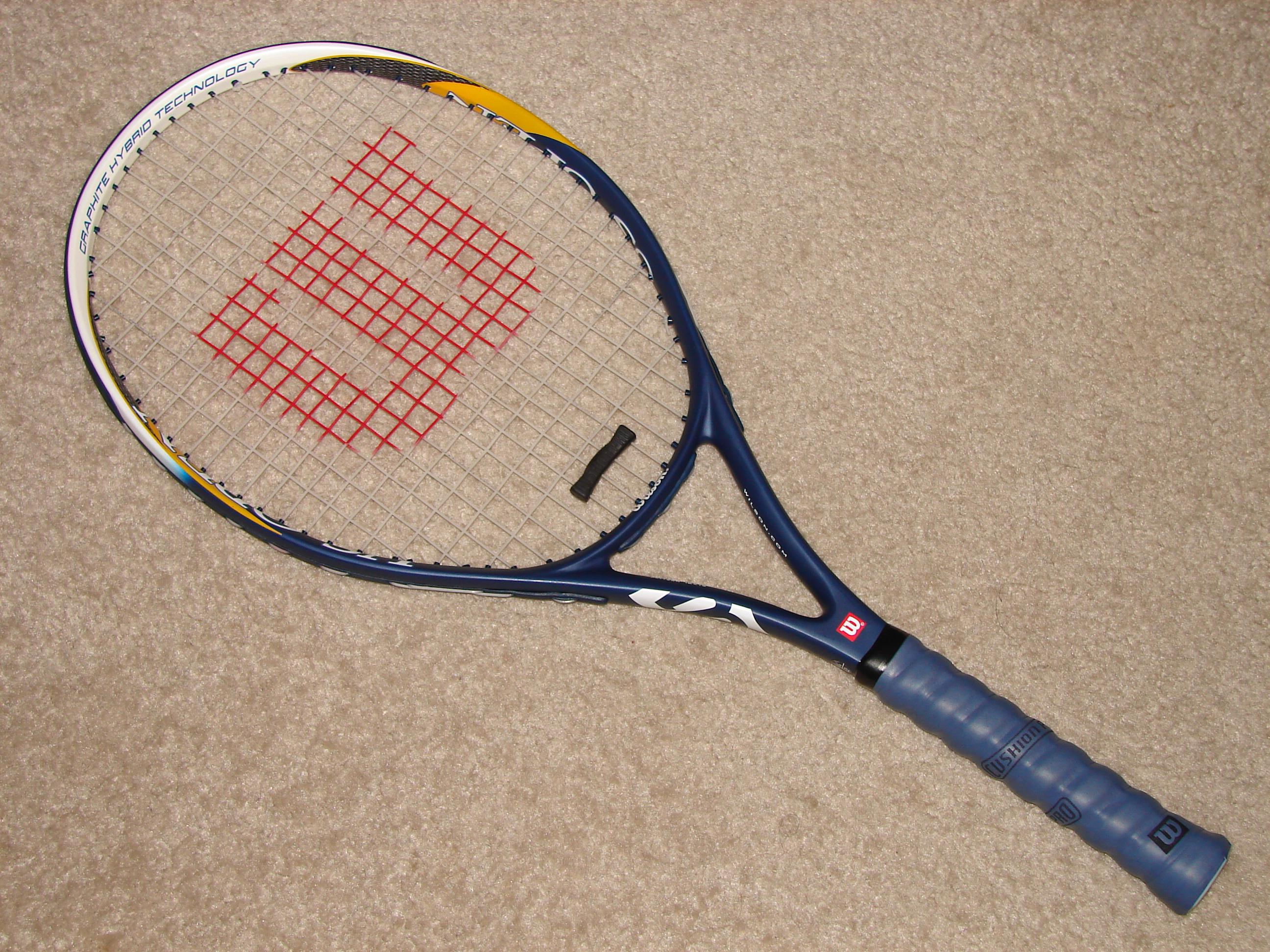 ടെന്നീസ് റാക്കറ്റ്